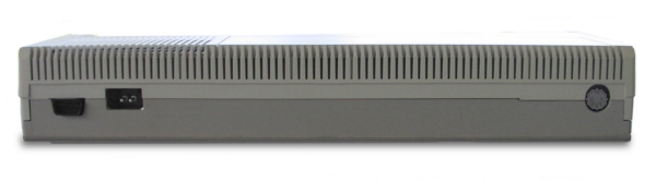 Foto eines Texas Instruments TI-99/4A (beige Version, Rückansicht)